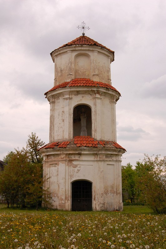 Vaizdas iš tolo.